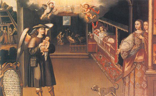 Serie de la vida de San Francisco de Asís en la iglesia de San Francisco en Santiago de Chile.